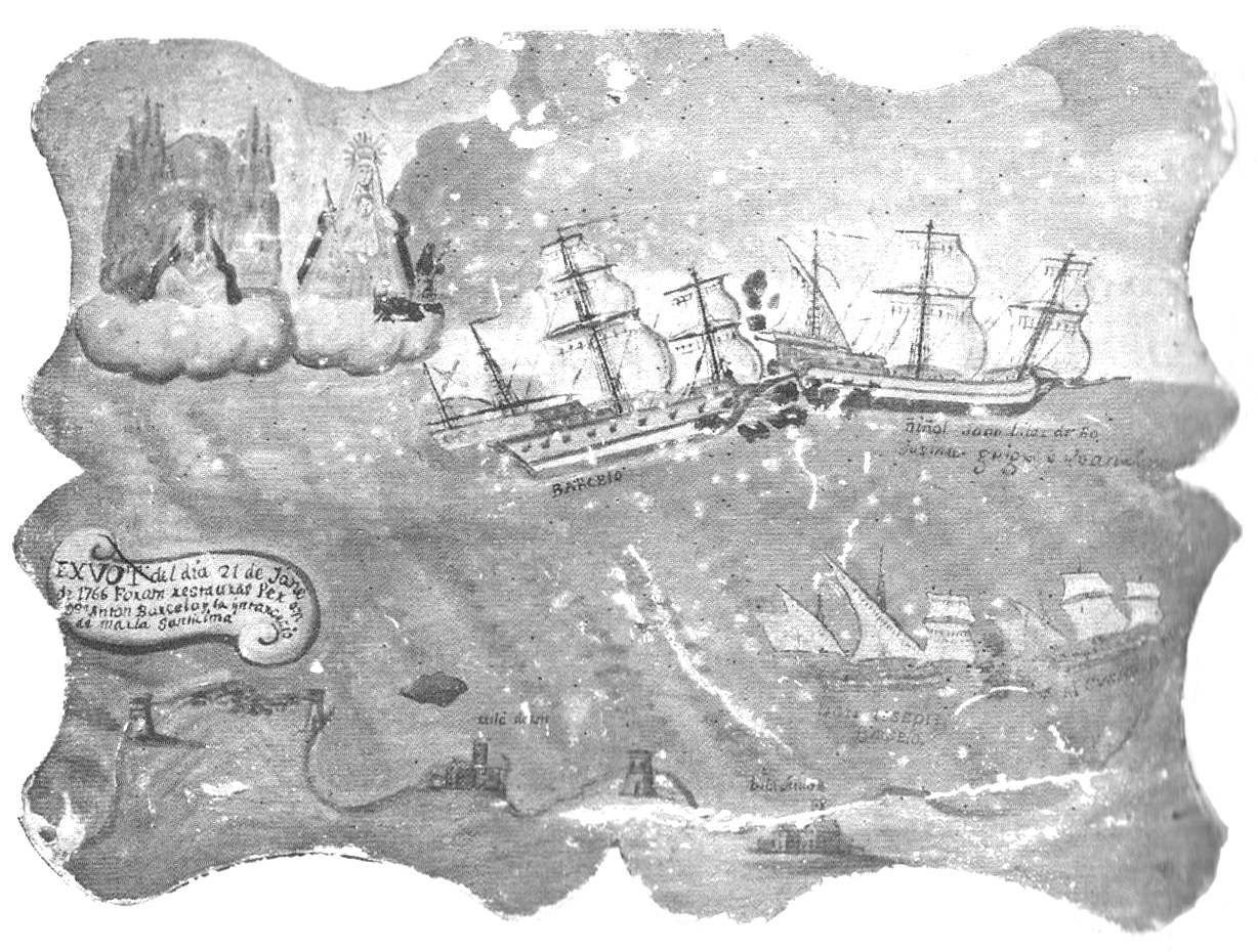 LEYENDA: "EXVOT del diá 21 de Jane de 1766 Foram restauras Per en Don Anton Barceló y la interceció de María Santisima."